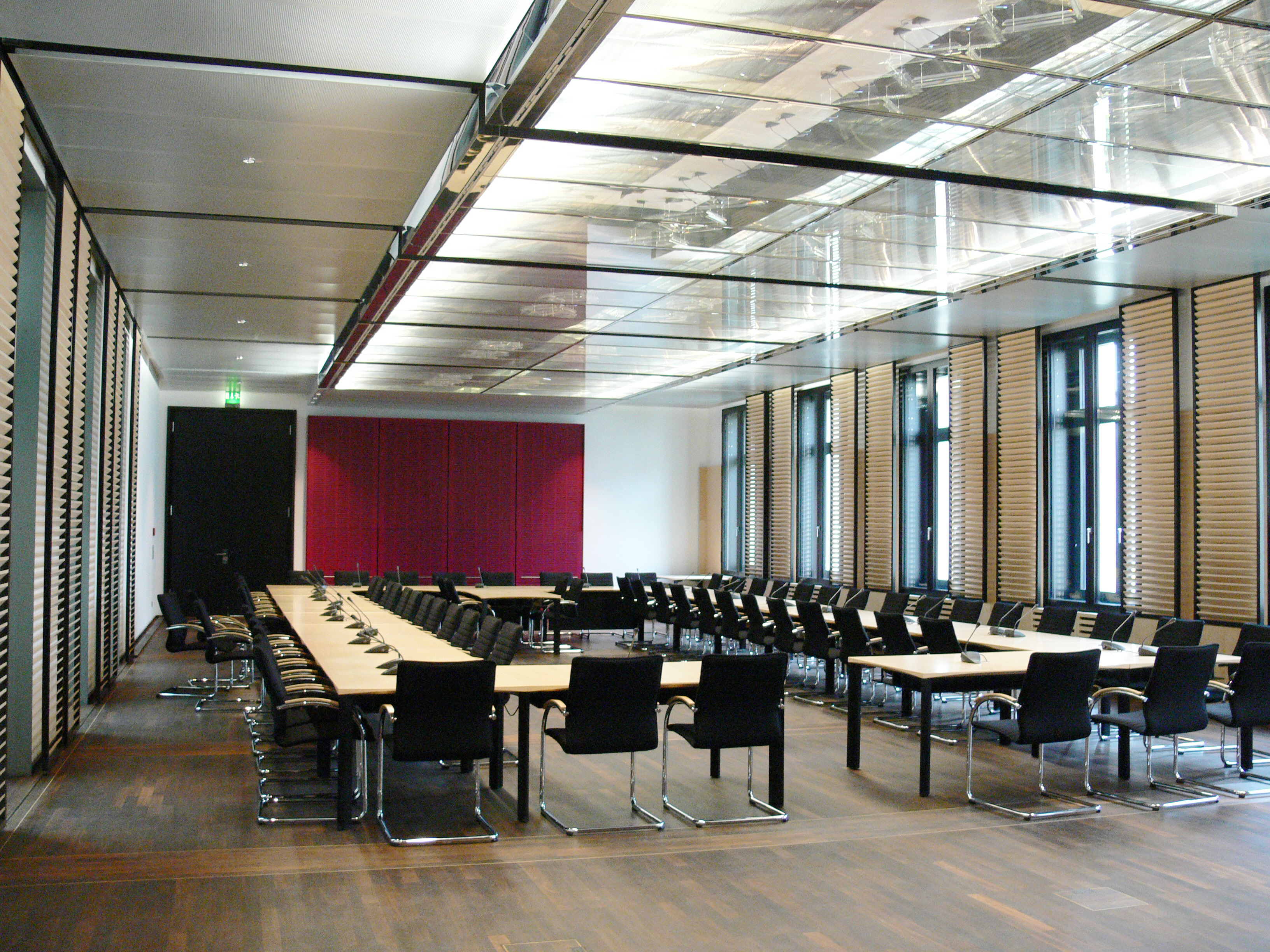 Bundesrat (ehem. Preußisches Herrenhaus, Leipziger Str., Berlin): ein Ausschußssitzungssaal, in dem u. a. Sitzungen des Vermittlungsausschusses stattfinden